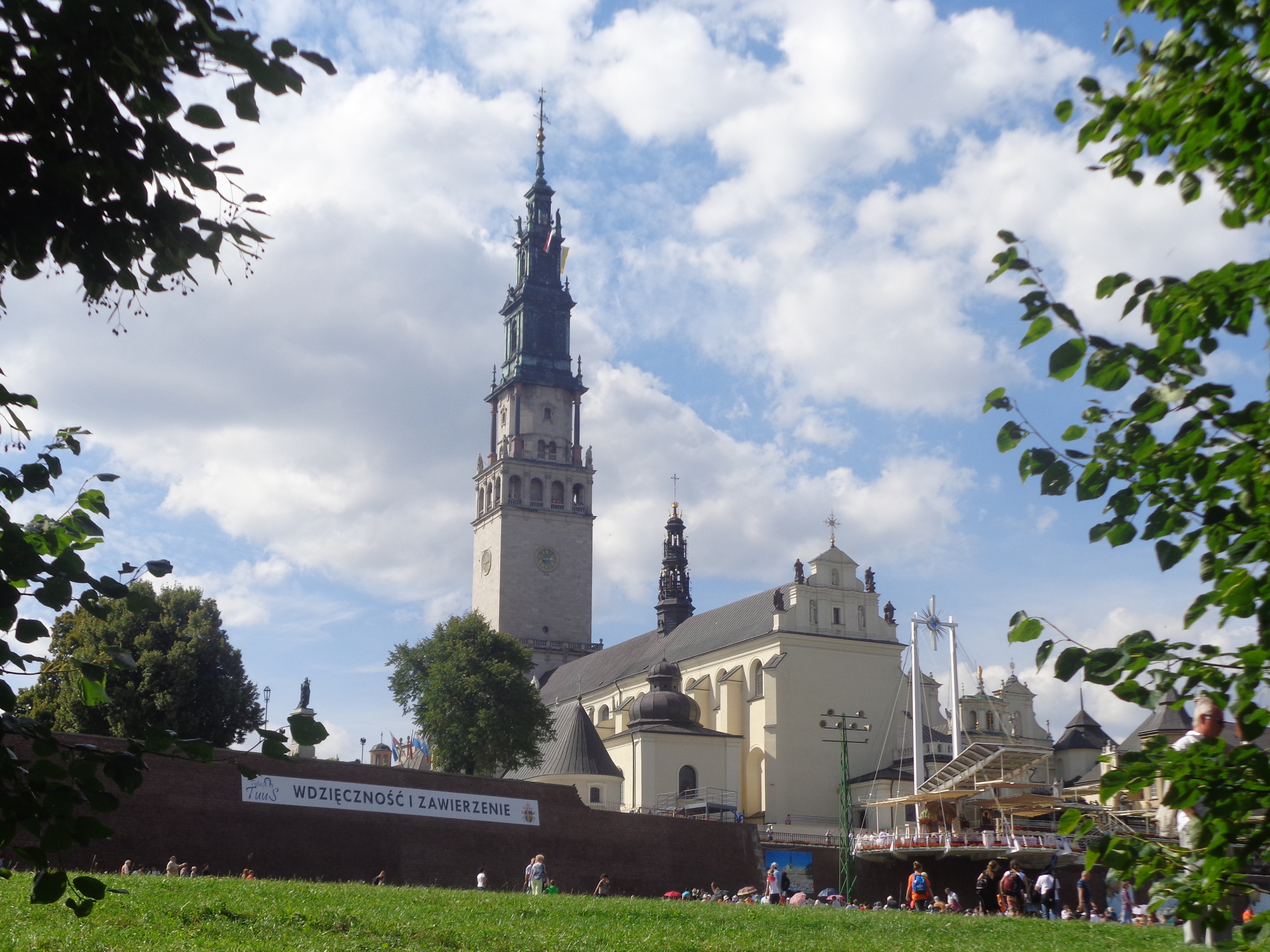 Częstochowa, zespół klasztorny oo. Paulinów na Jasnej Górze